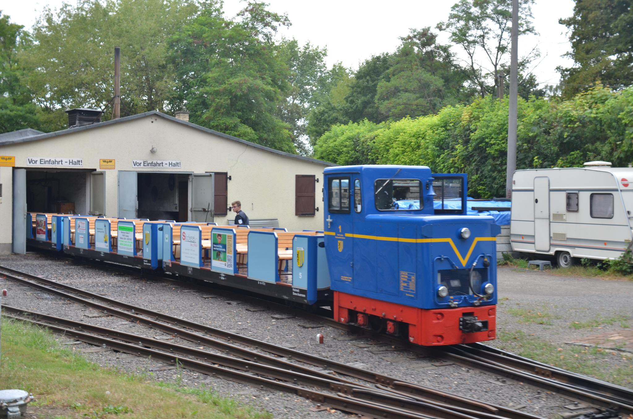 Parkeisenbahn Auensee